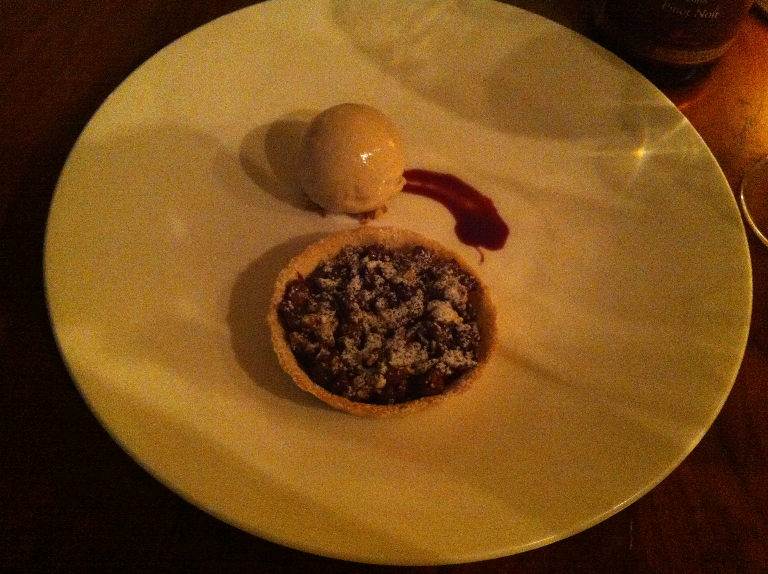 Torta de figo do Indigo, superb.